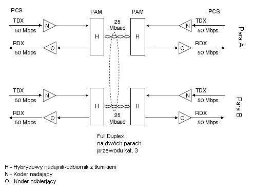 w tej formie rysunek został wykonany przeze mnie